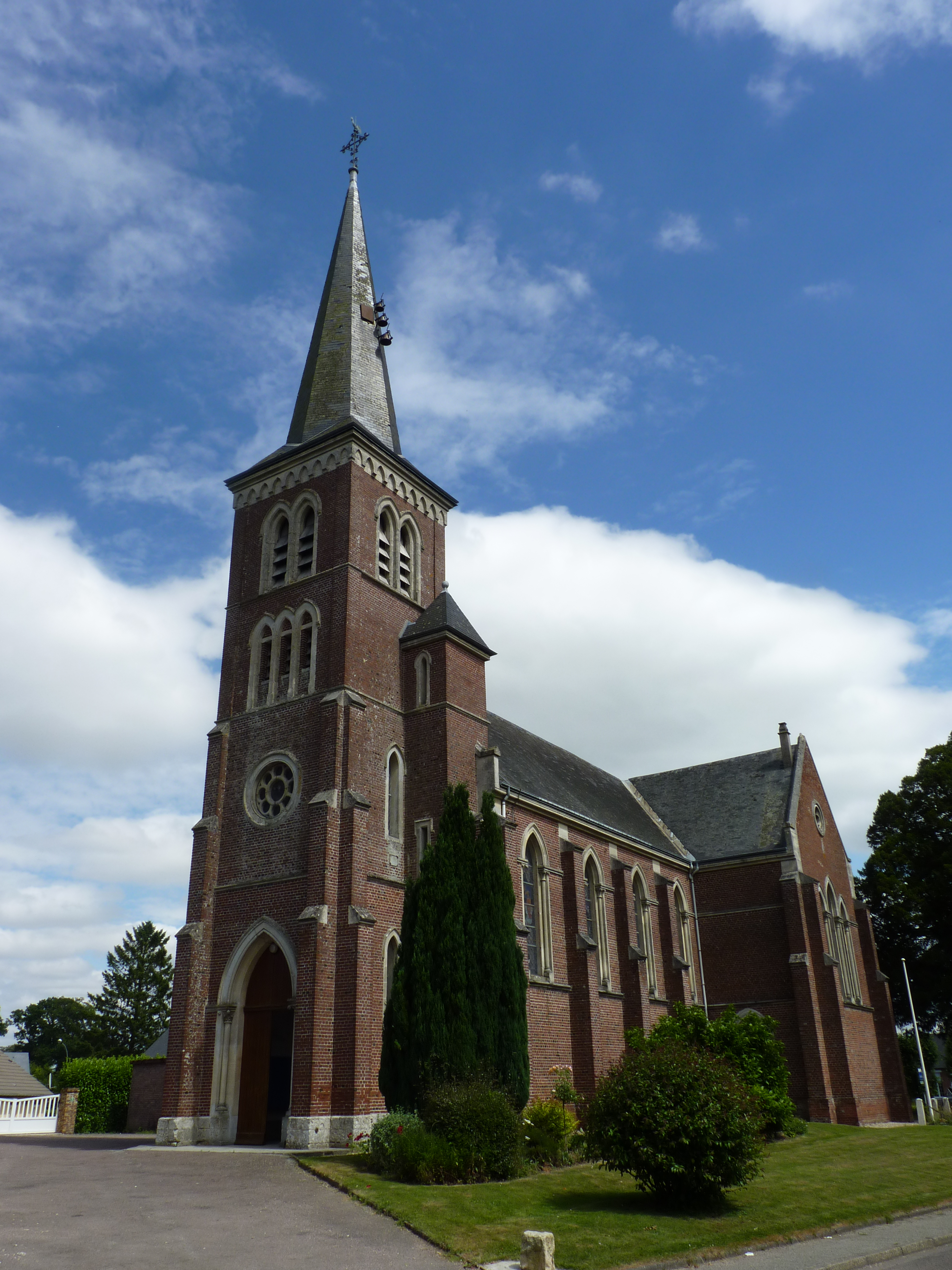 commencement des travaux de l'église actuelle en 1882 fin des travaux 1903